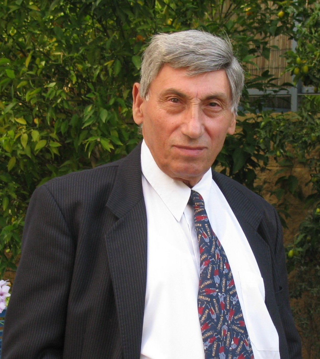 Ezra Morad, private picture